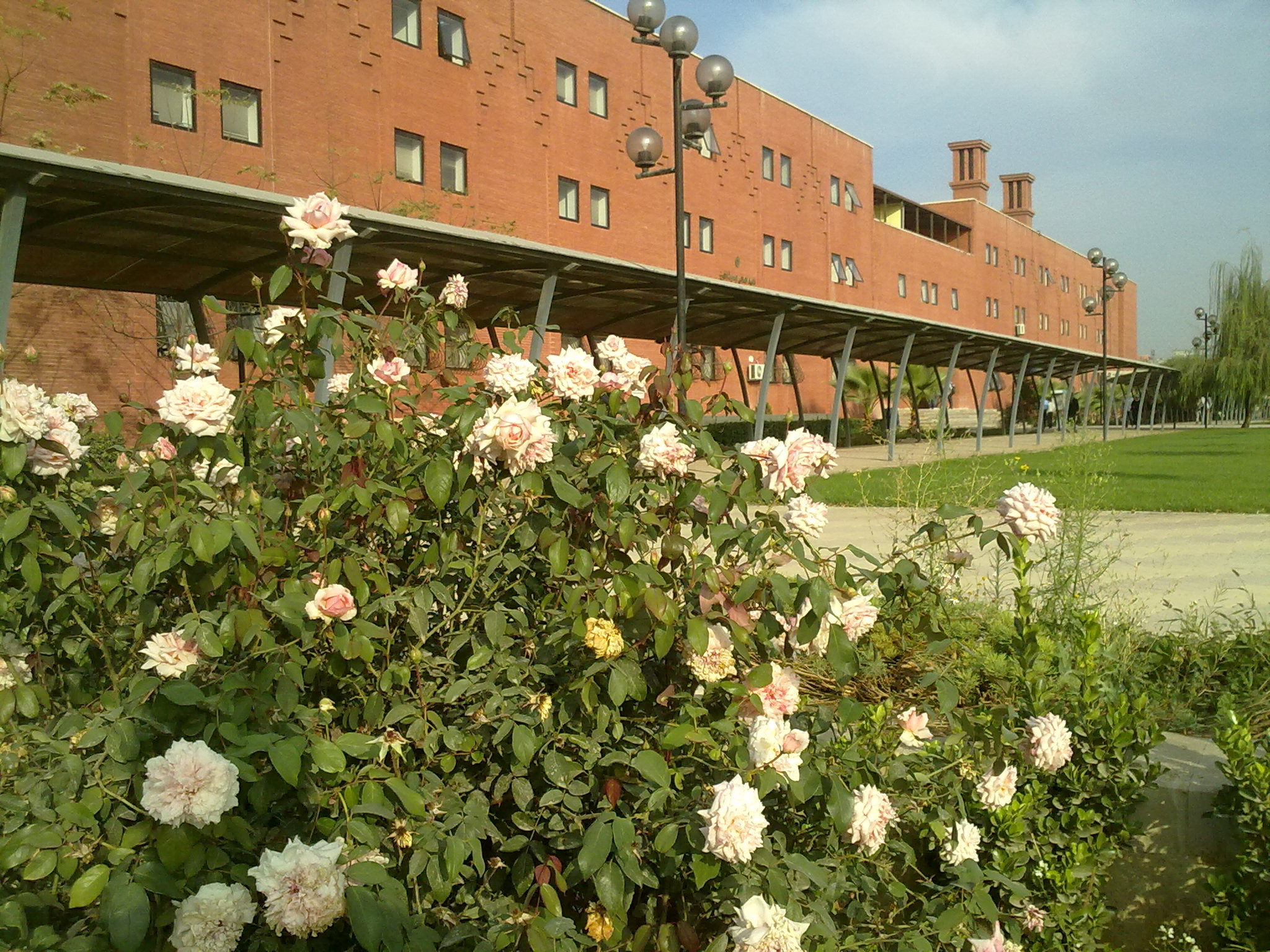 البناء الأحمر